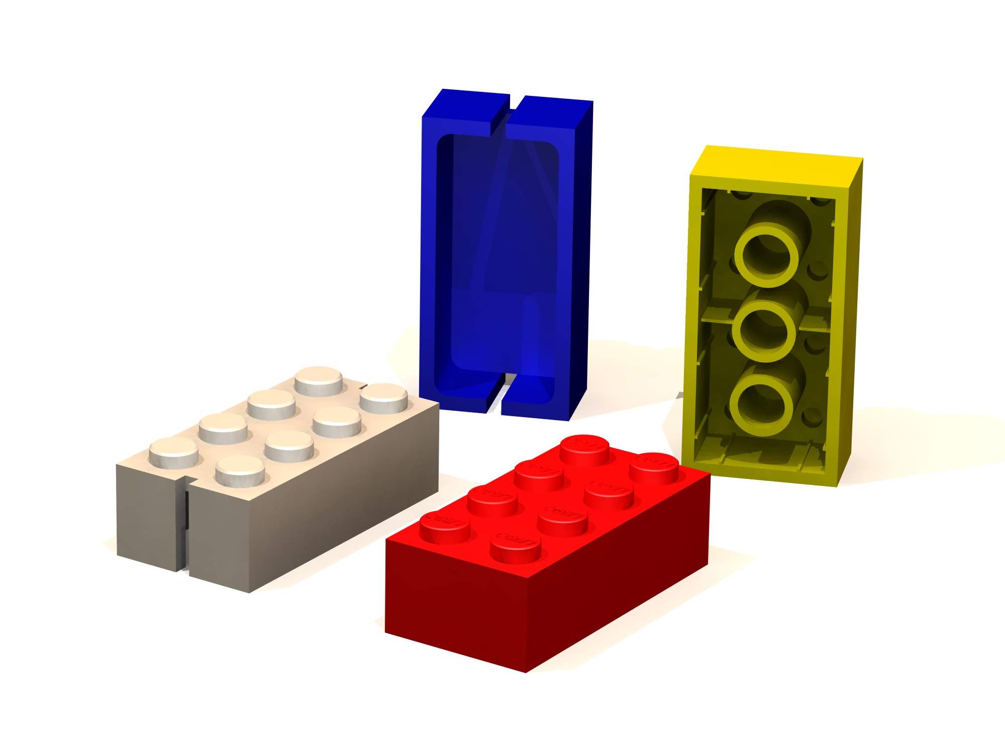 image de synthèse briques lego de 1949,une brique moderne Lego droite. Ralisation sous SolidWorks.